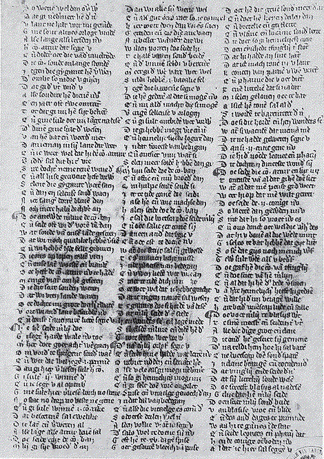 De Munsterse fragmenten van Velthems Merlijncontinuatie door Lodewijk van Velthem